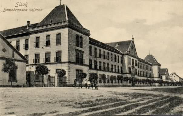 Domobranska vojarna u Sisku